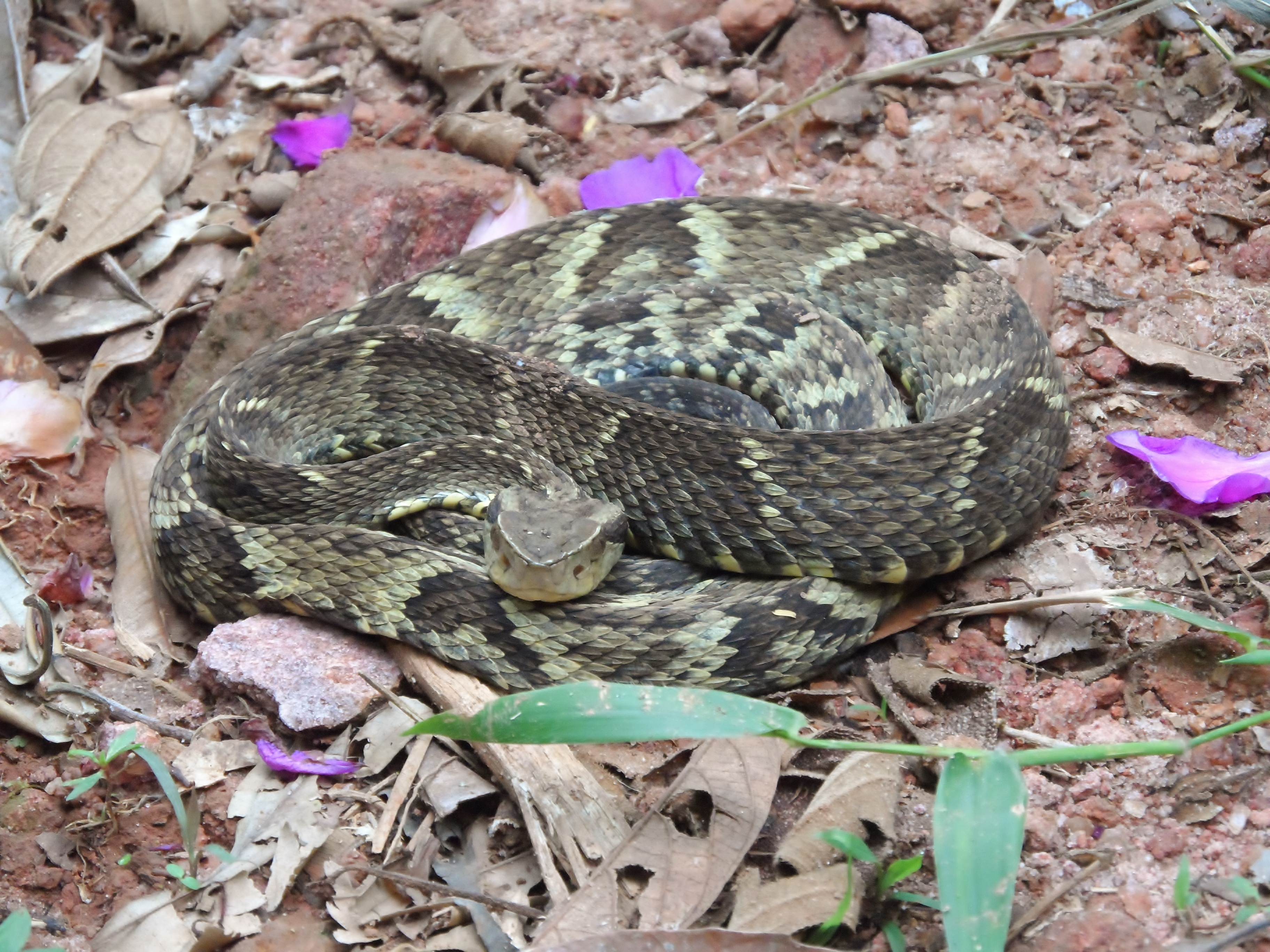 Jararaca-da-mata (Bothrops jararaca) na RPPN São Lourenço do Funil, Serra Negra, município de Rio Preto, Zona da Mata, Minas Gerais, Brasil.